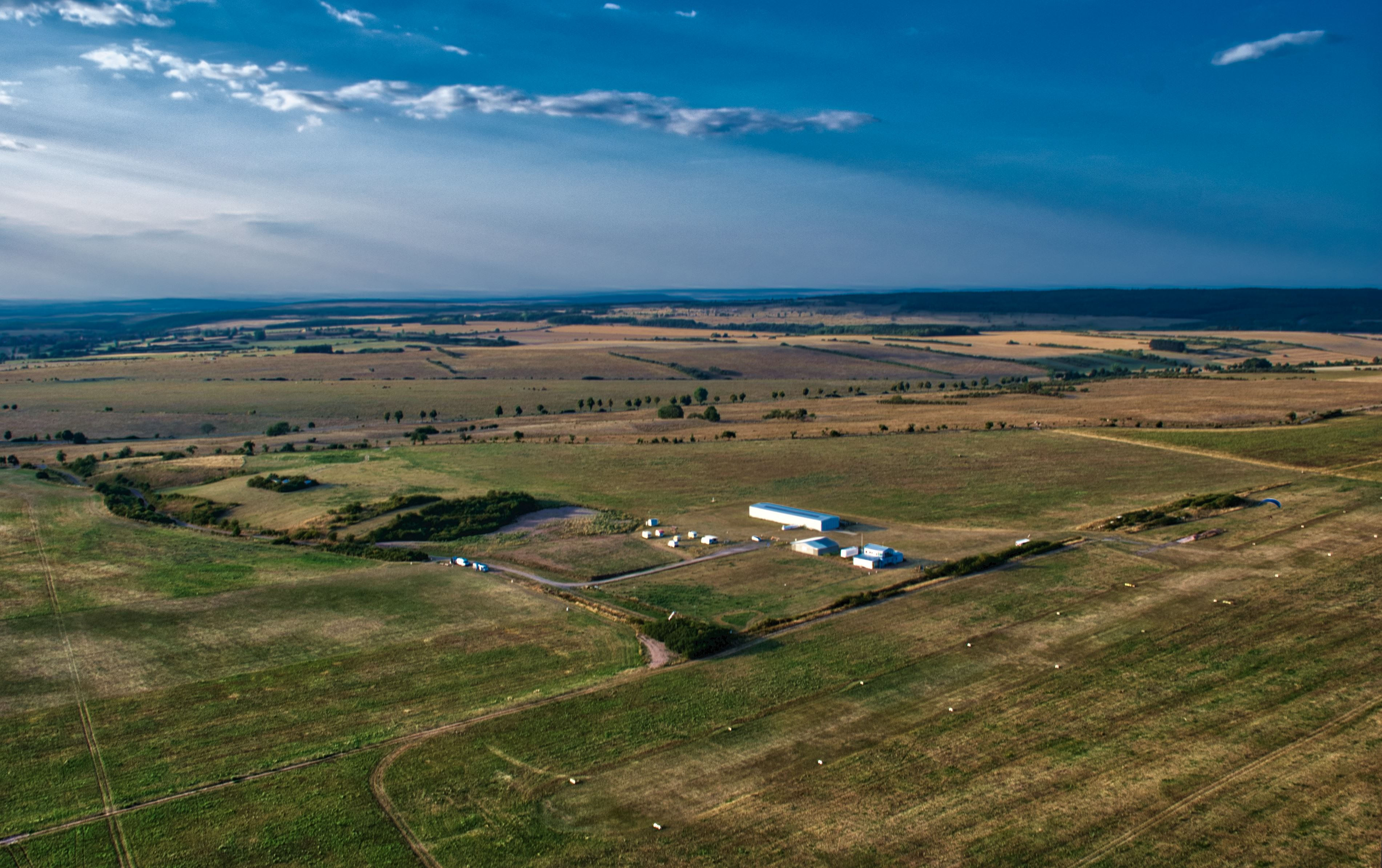 Luftaufnahme des Sonderlandeplatzes Idyllisch gelegen in der Thüringeti